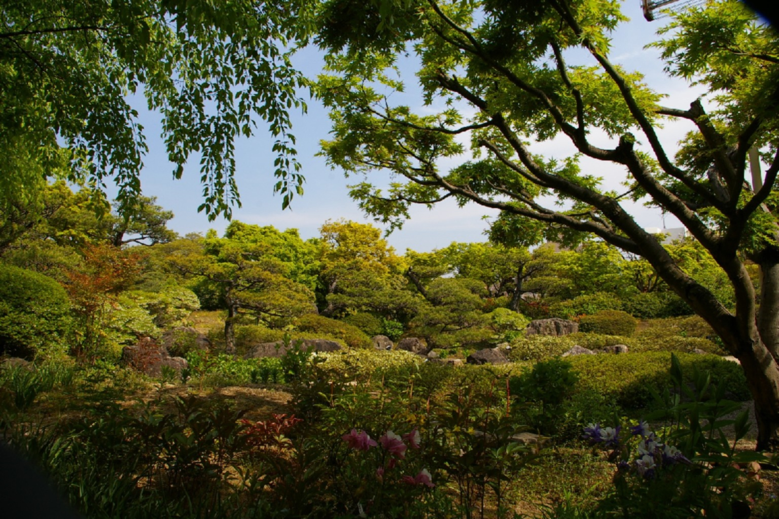 筥崎宮花庭園